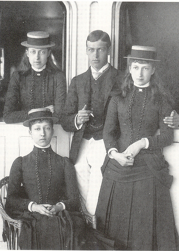 Futuro rei Jorge V com as suas irmãs Luísa, Vitória e Maud